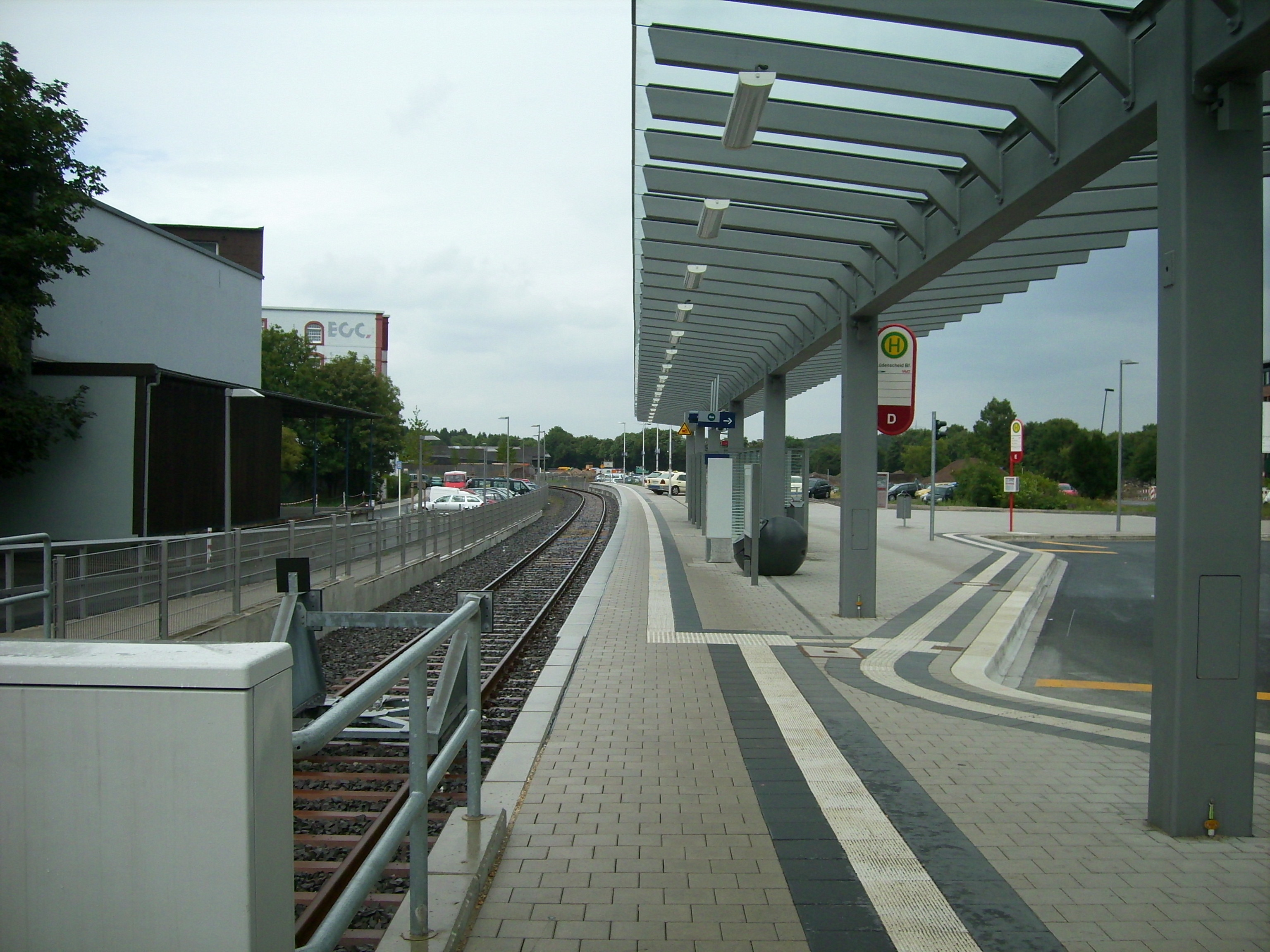 Bahnhof Lüdenscheid